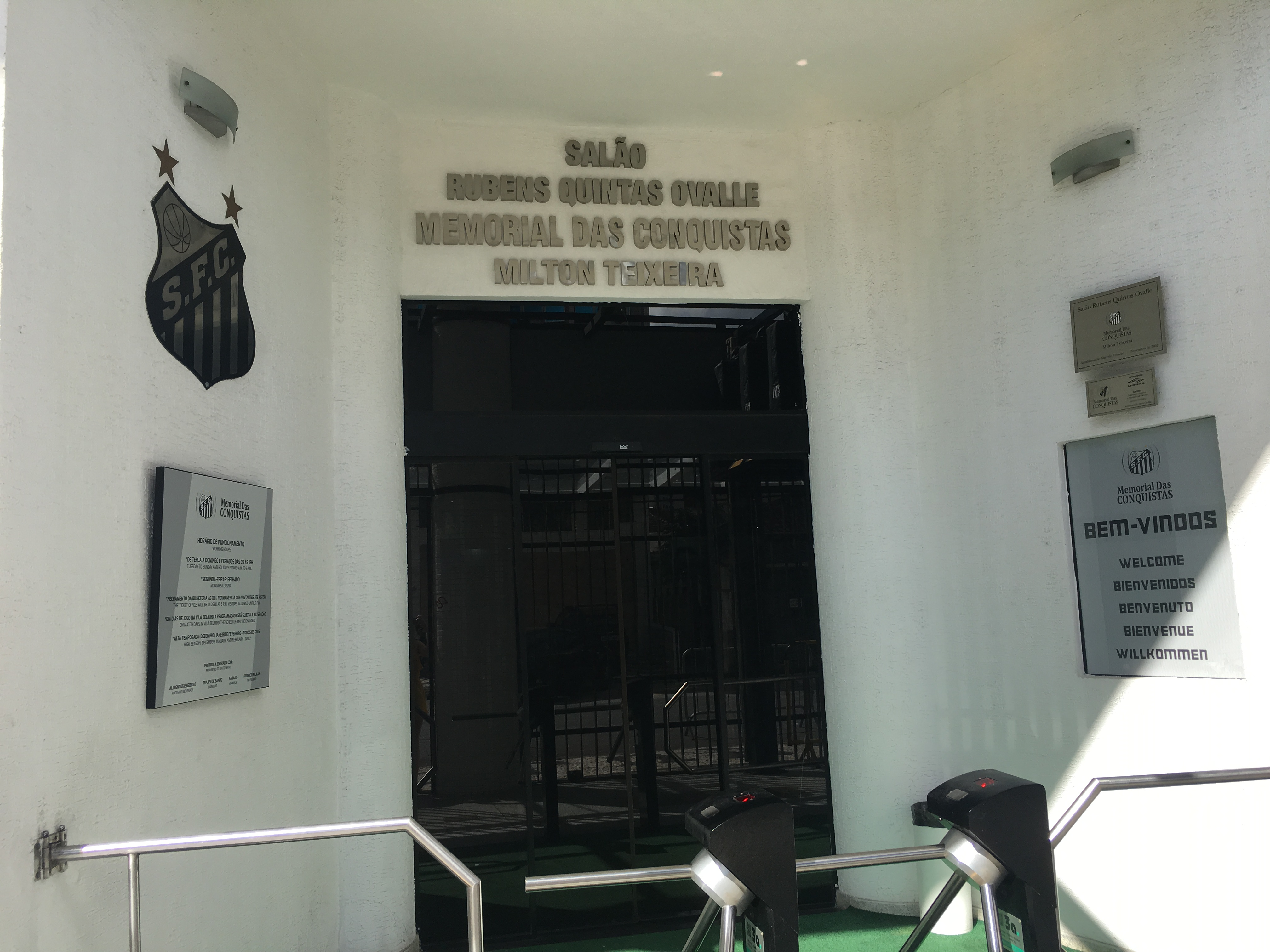 Entrada Salão Rubens Quintas Ovalle, Memorial das Conquistas.